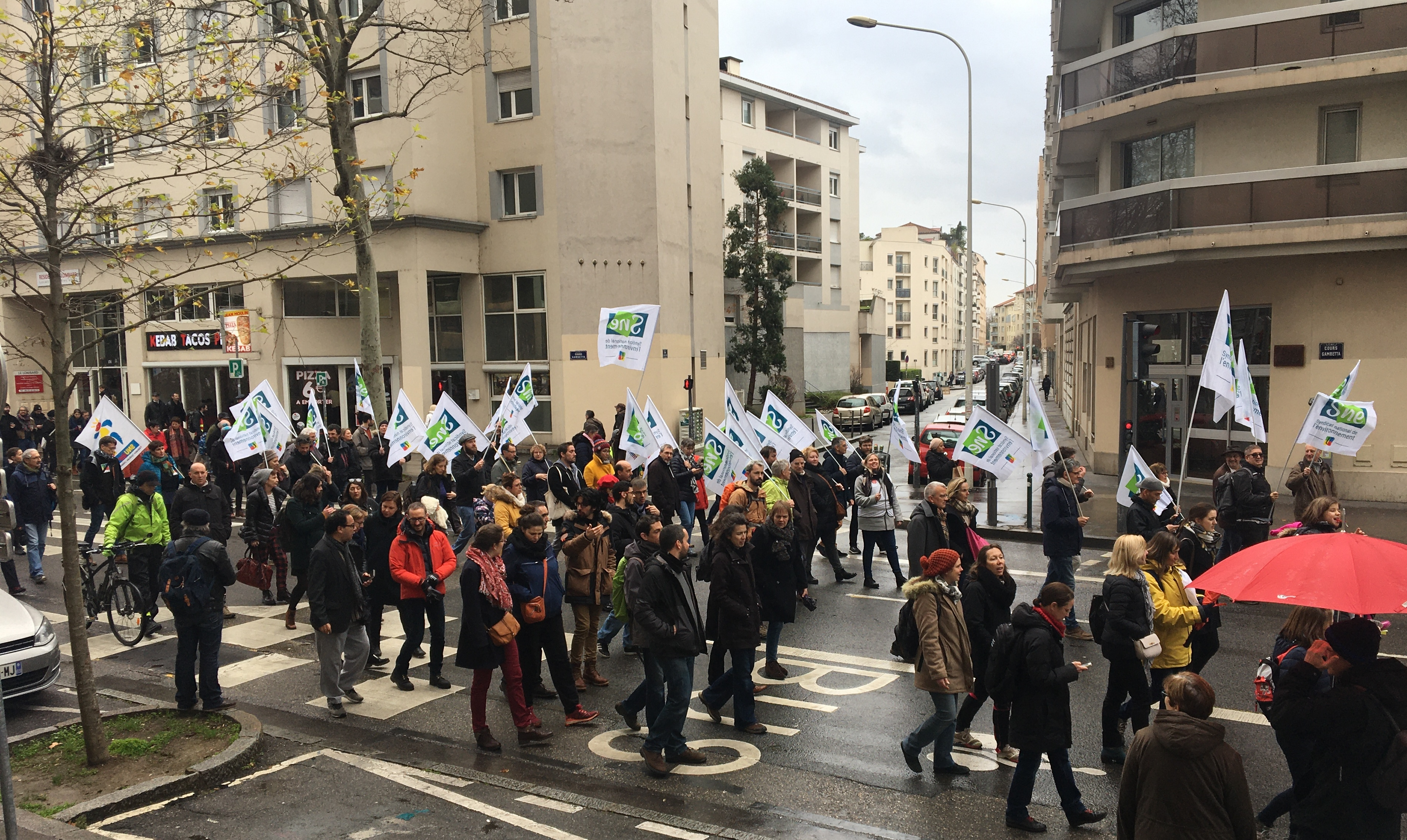 Délégation du Syndicat national de l'environnement (SNE) lors de la manifestation contre le projet de réforme des retraites à Lyon le 29 janvier 2020.